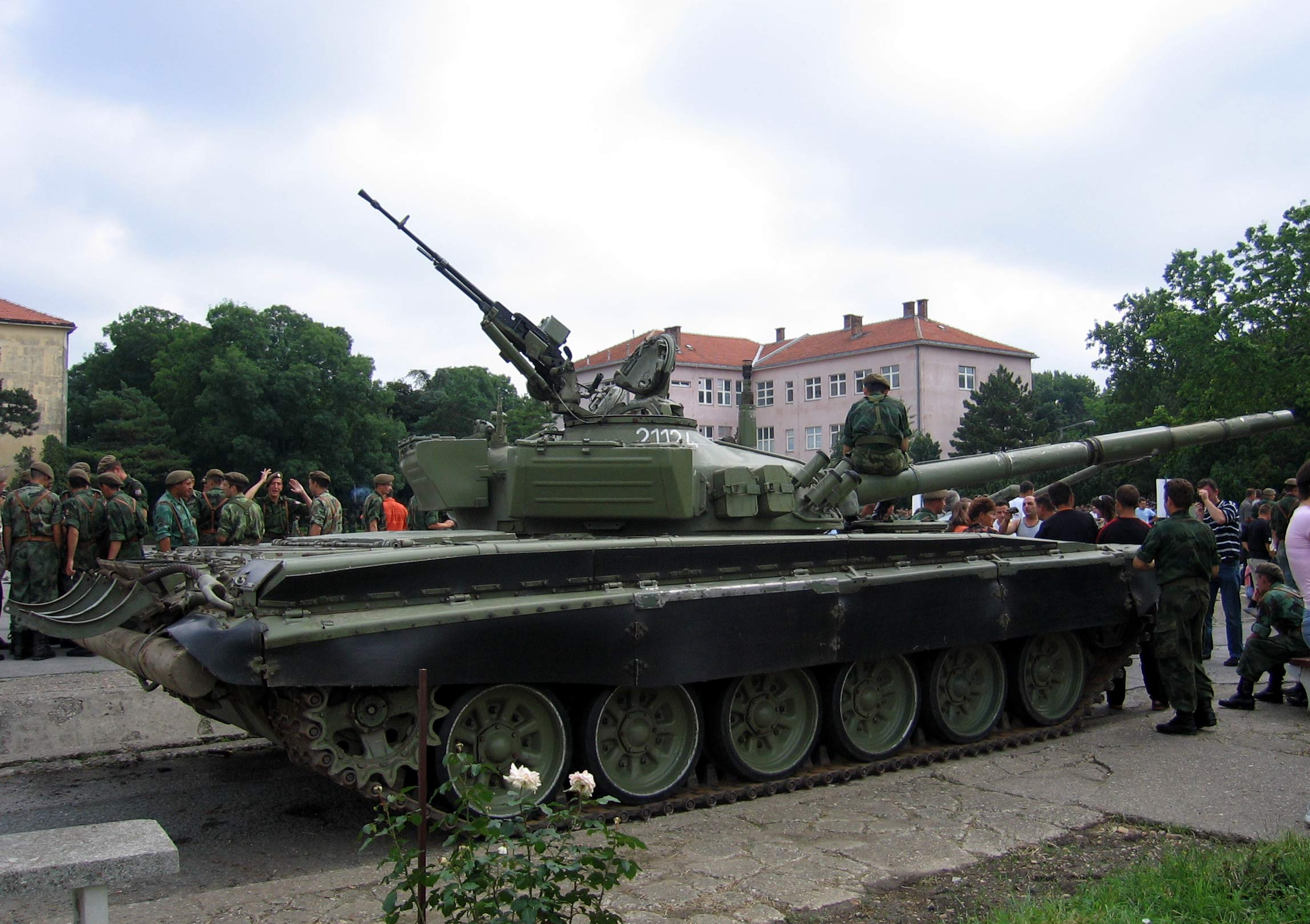 Тенк М-84, поглед са стране.